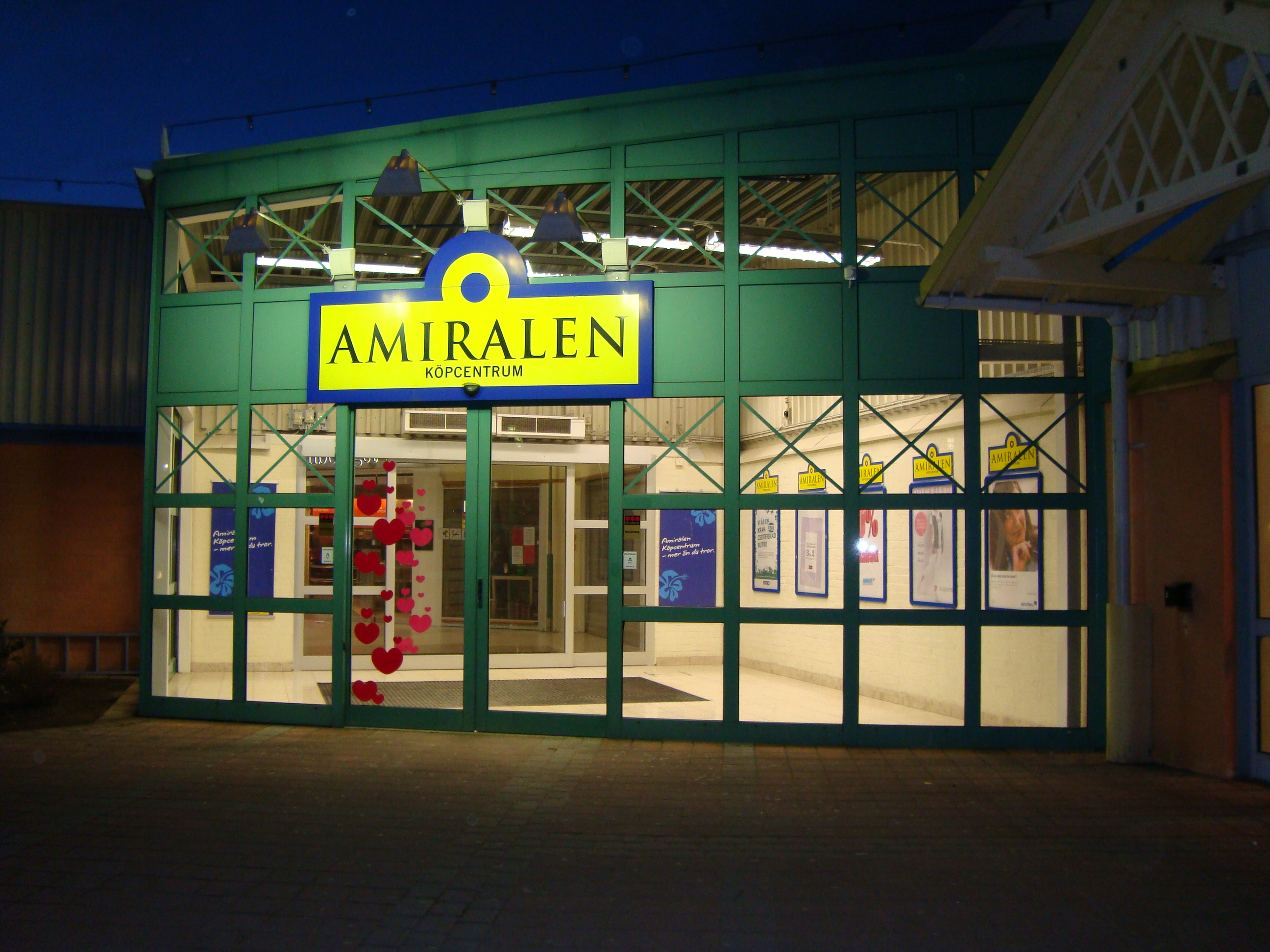 Ingång till Amiralen köpcentrum, Karlskrona.